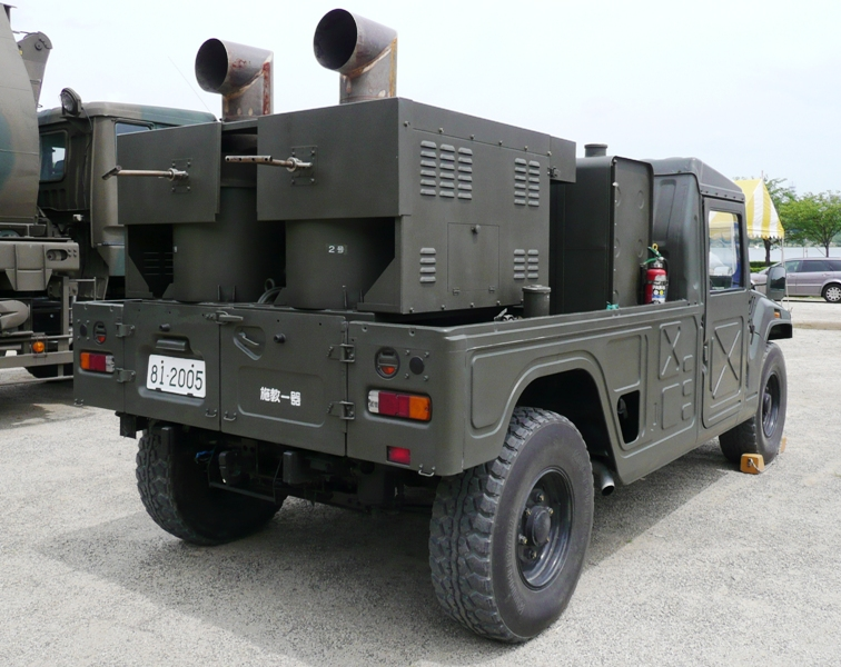 Hatsuenki type 3. 発煙機3型